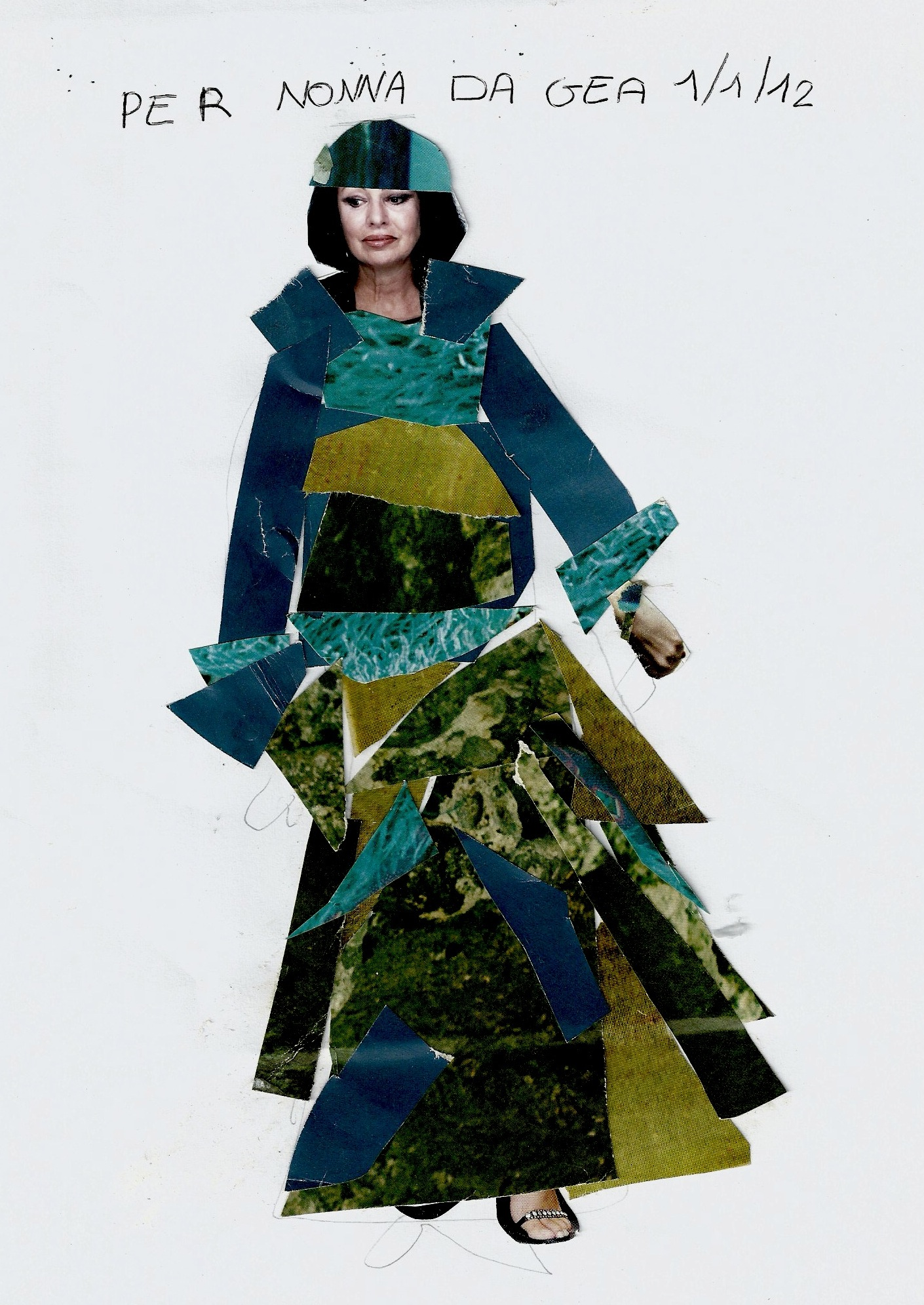 La costumista teatrale e scenografa Elena Mannini. Collage di Gea Dall'Orto.